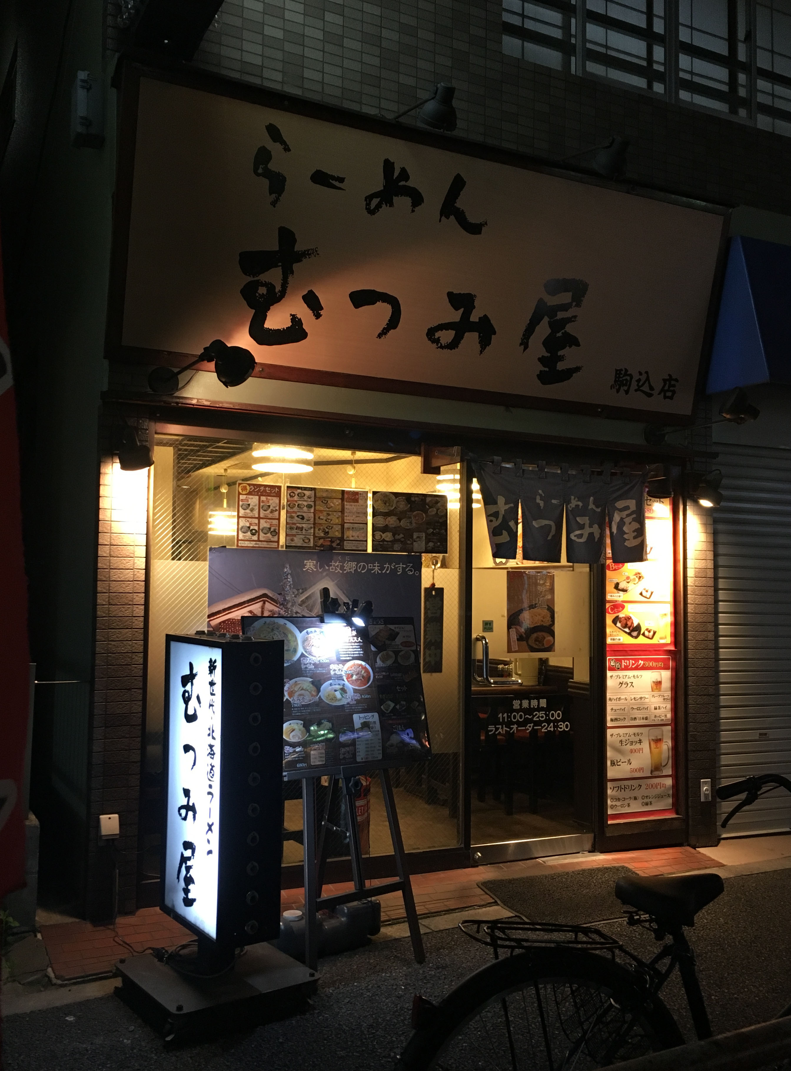 むつみ屋 駒込店